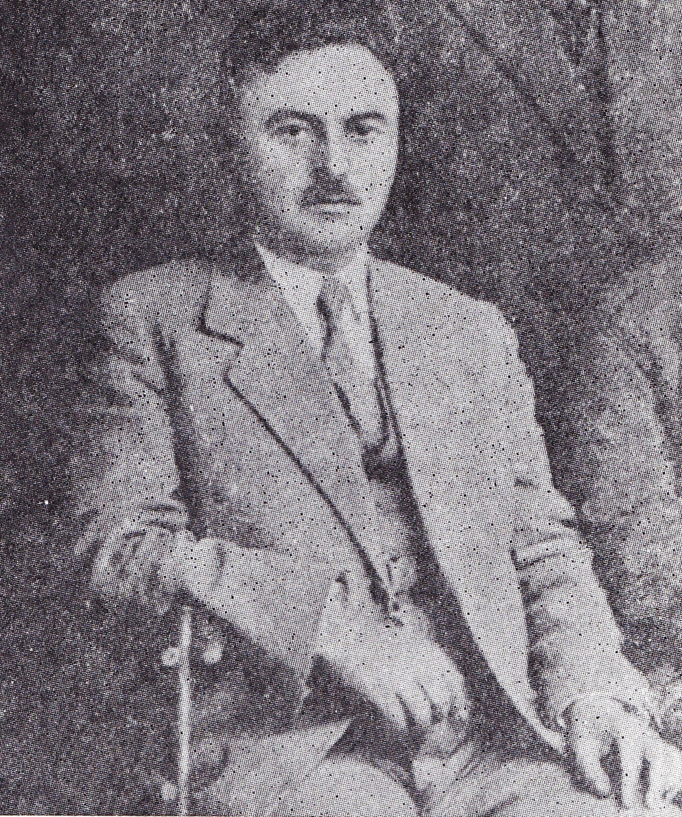 Portrait